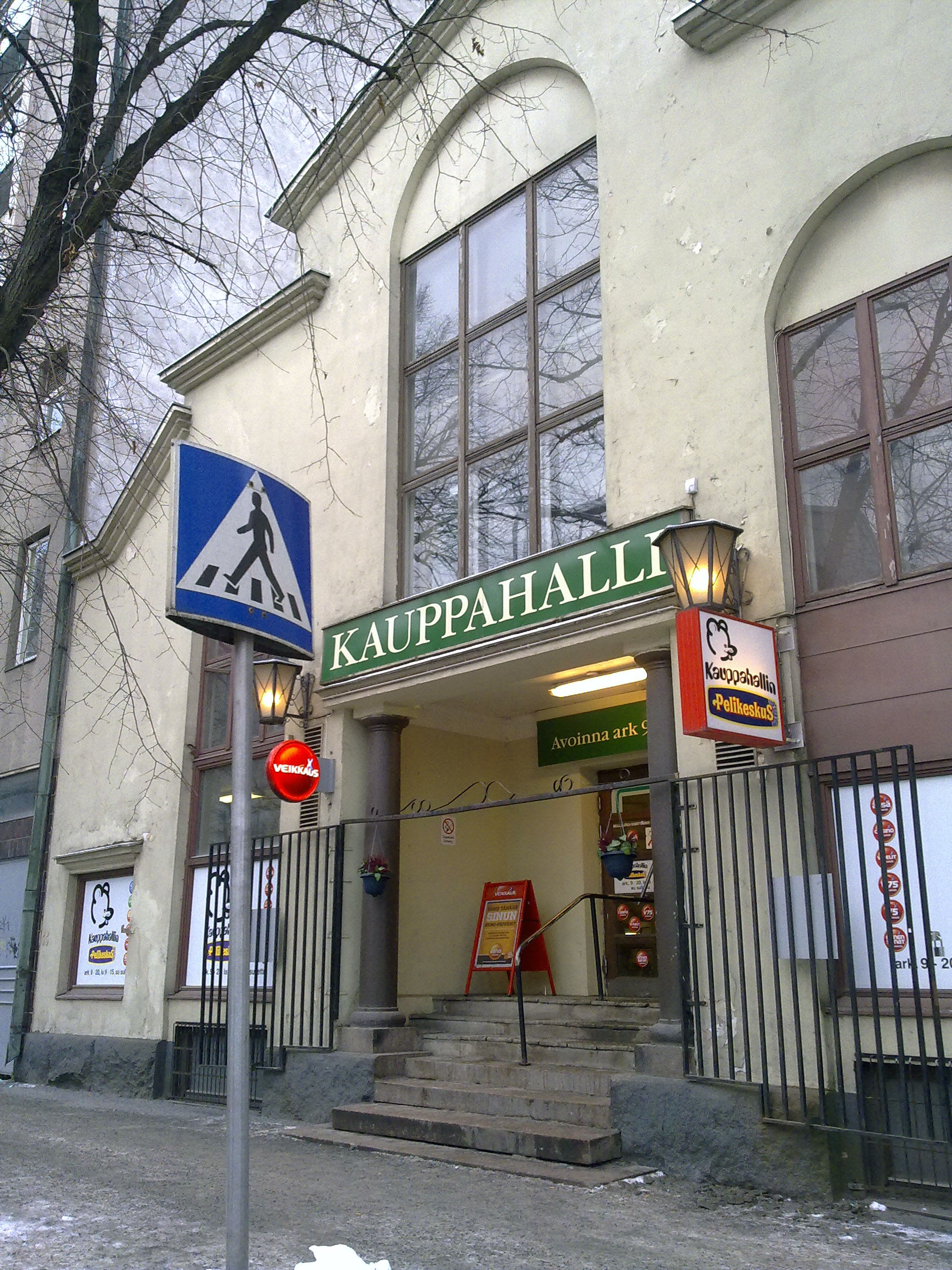 Porin kauppahallin Isolinnankadun puoleinen sisäänkäynti.